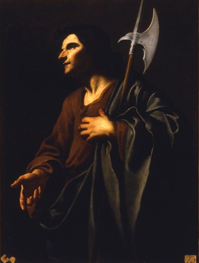 La obra representa a San Judas Tadeo, uno de los doce apóstoles de Jesucristo.